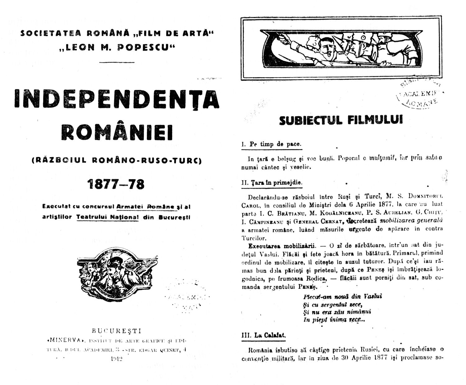 Program for Independenţa României film (1912)